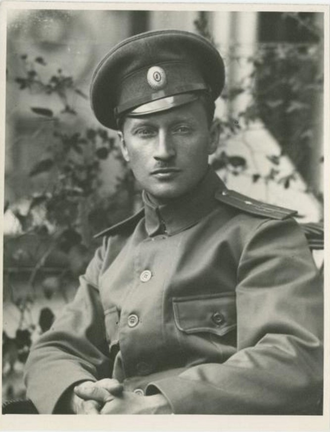 Гринберг Александр Данилович (фотограф)(в форме прапорщика). 1915г.